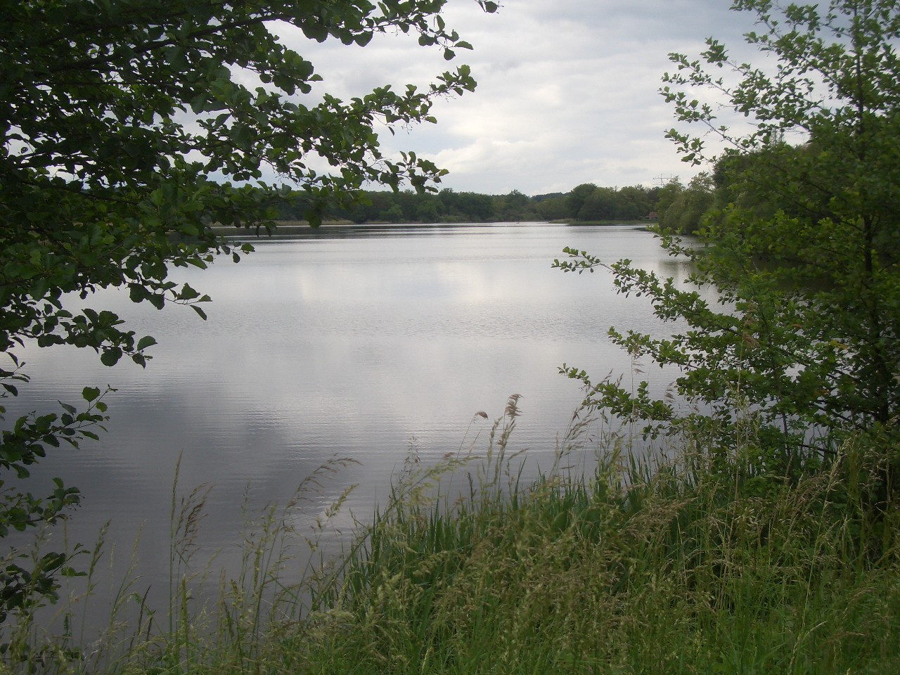 Etang de Longpendu